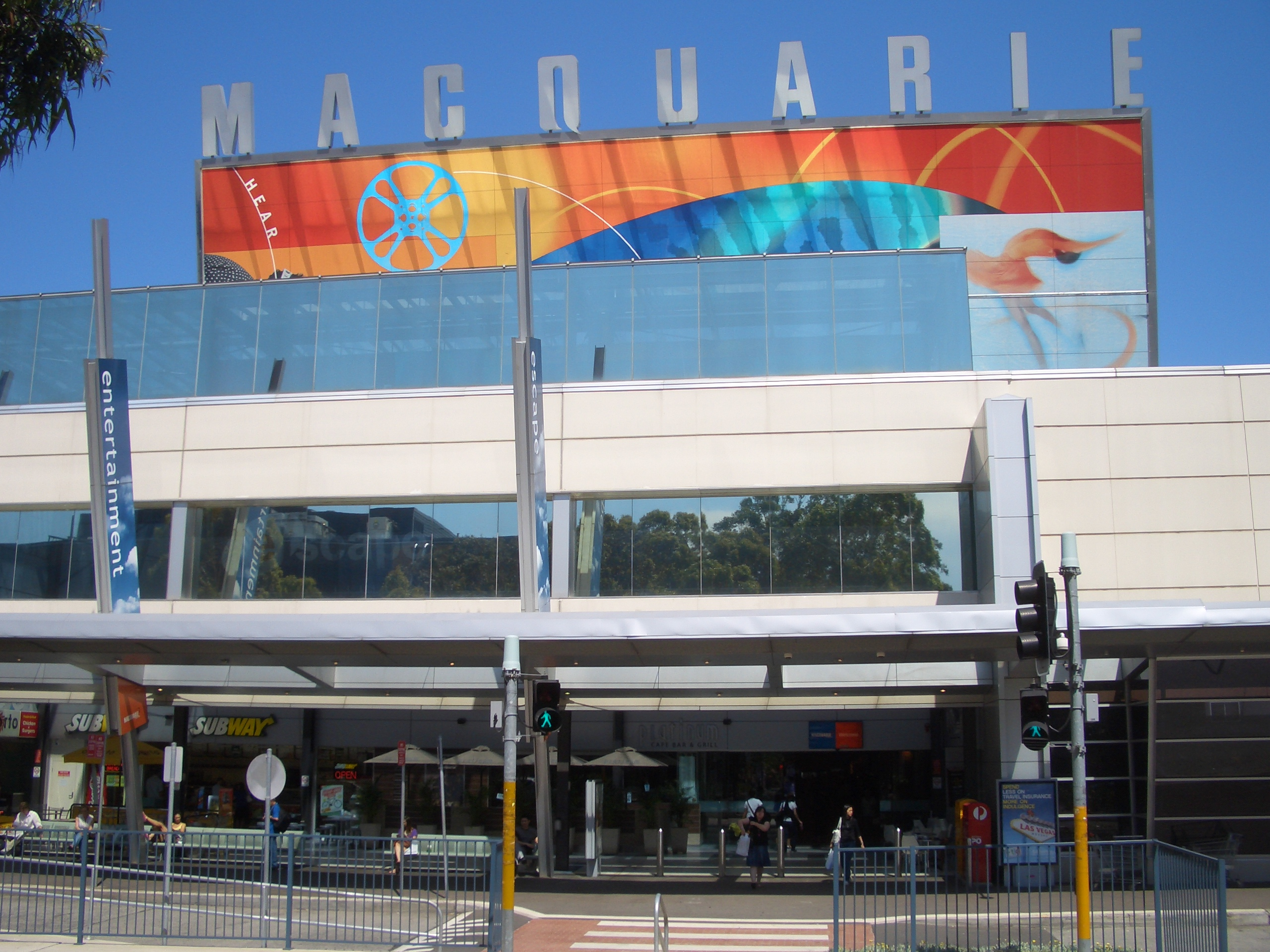 Macquarie Centre, Macquarie Park, Sydney